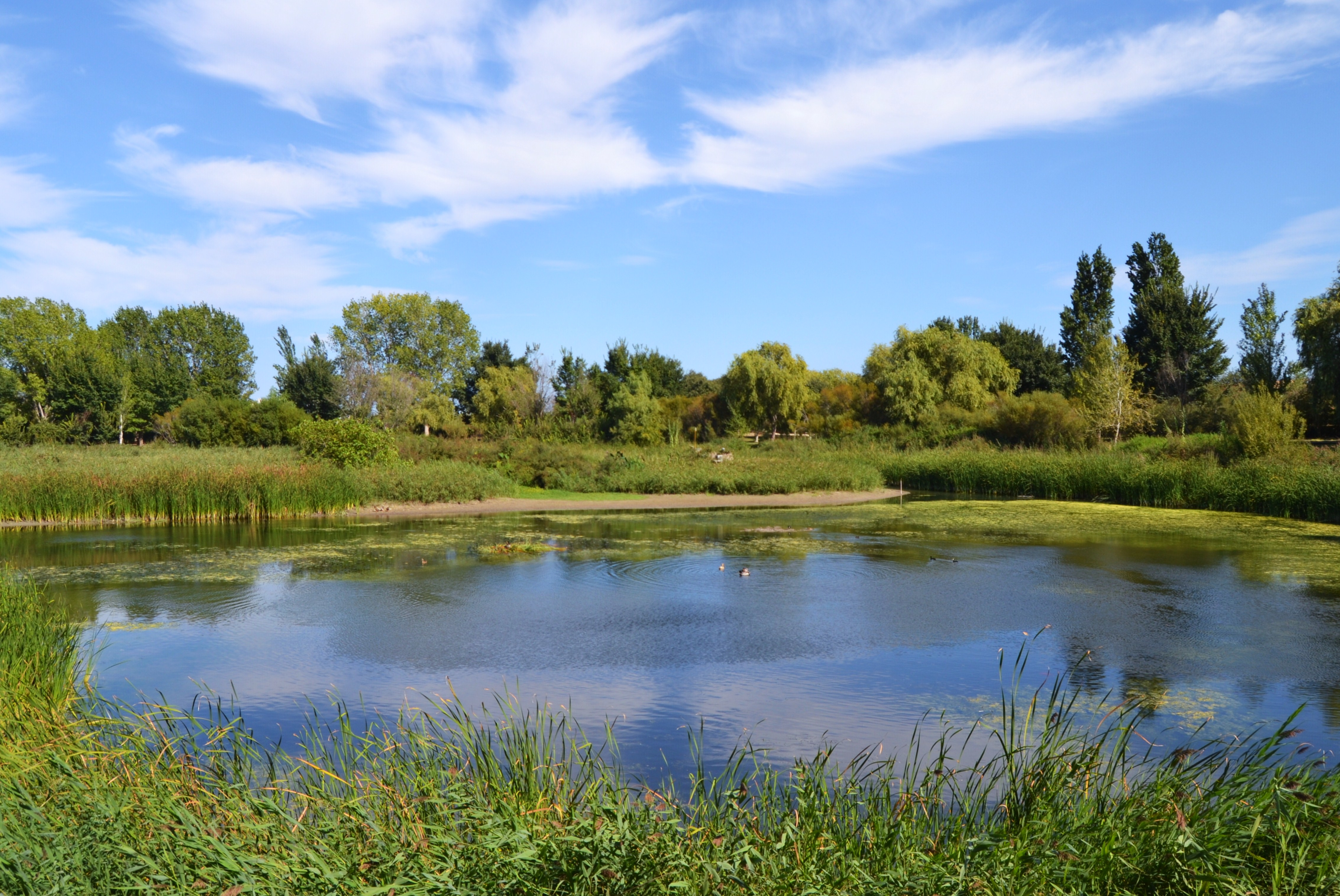 L'Ullal Gran o de l'Estany, Gandia.